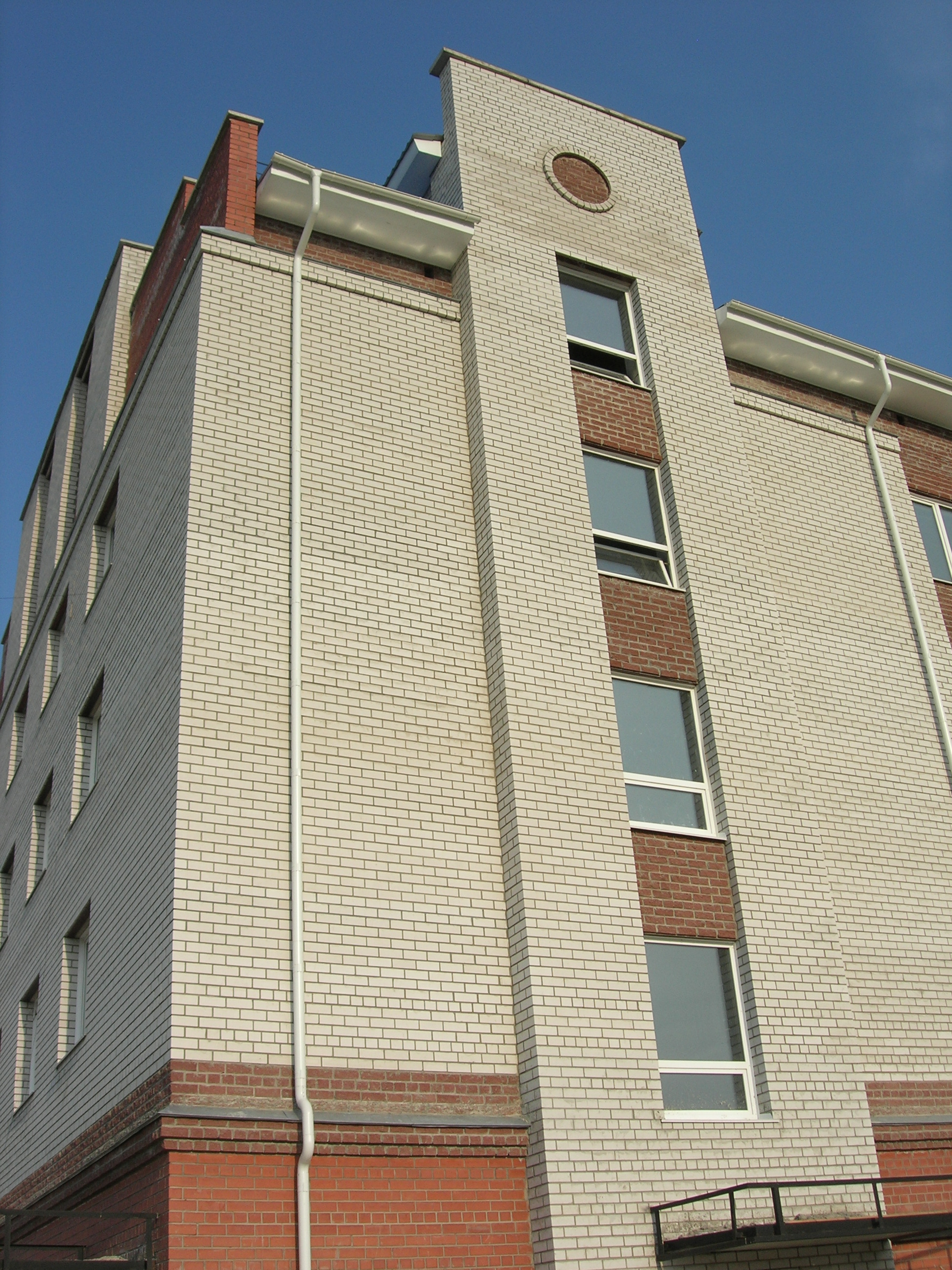 Водосточная система на здании